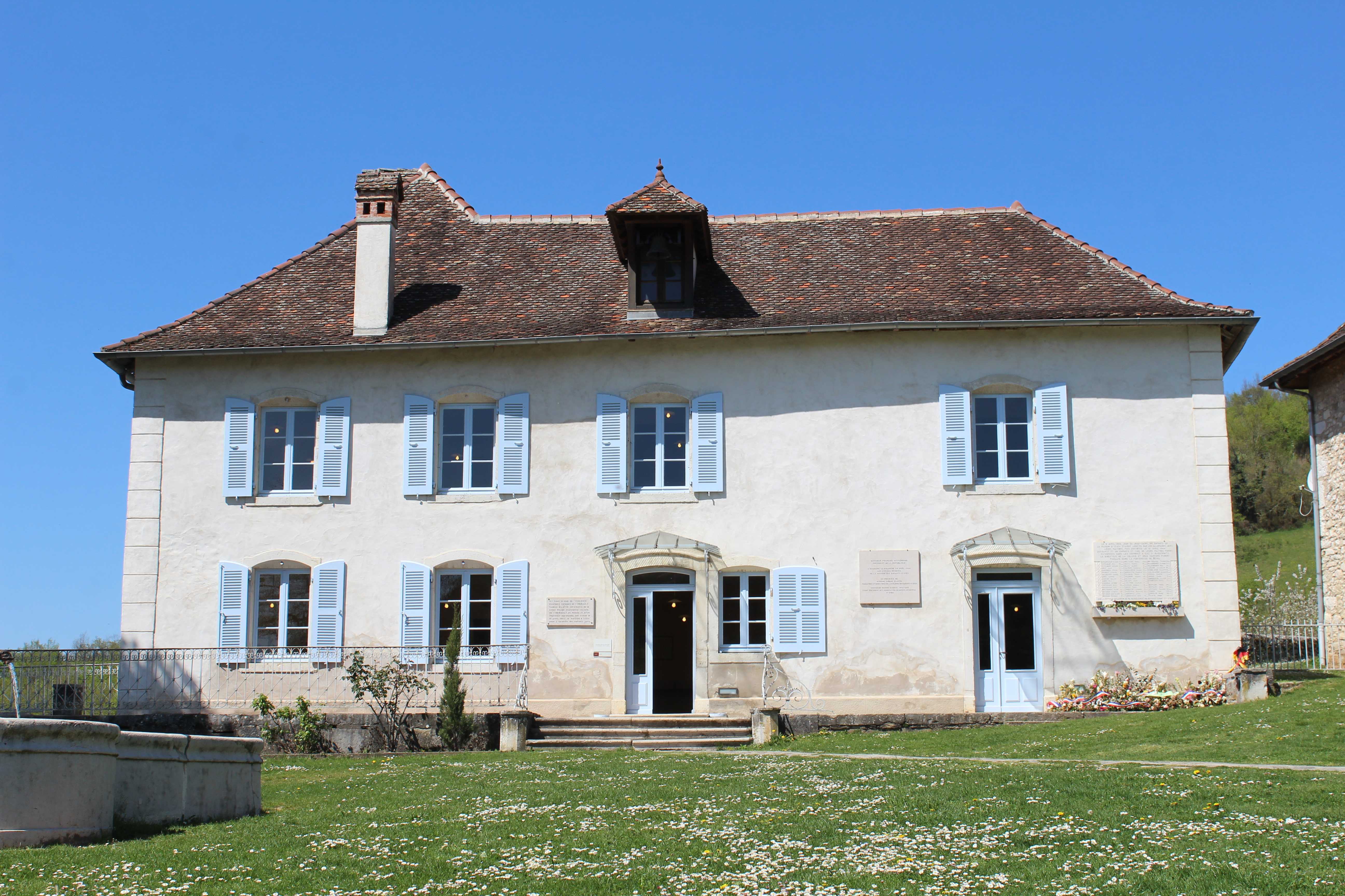 Mémorial des enfants juifs exterminés d'Izieu.